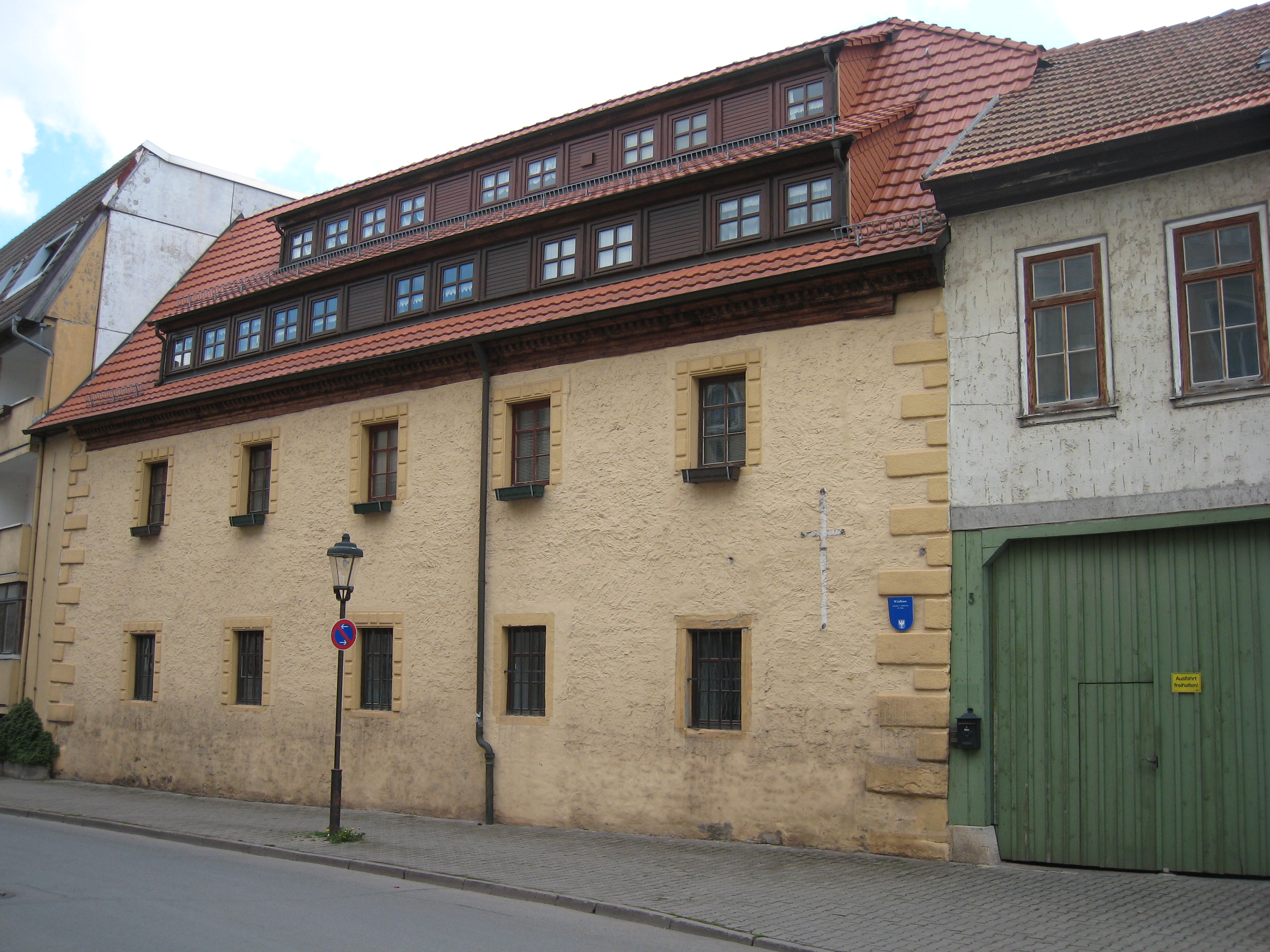 Waidhaus in Arnstadt, An der Weiße 3